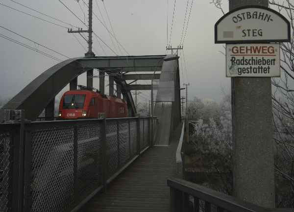 Die Ostbahnbruecke und der Steg an der Ostbahnbruecke ueber den Donaukanal in Wien